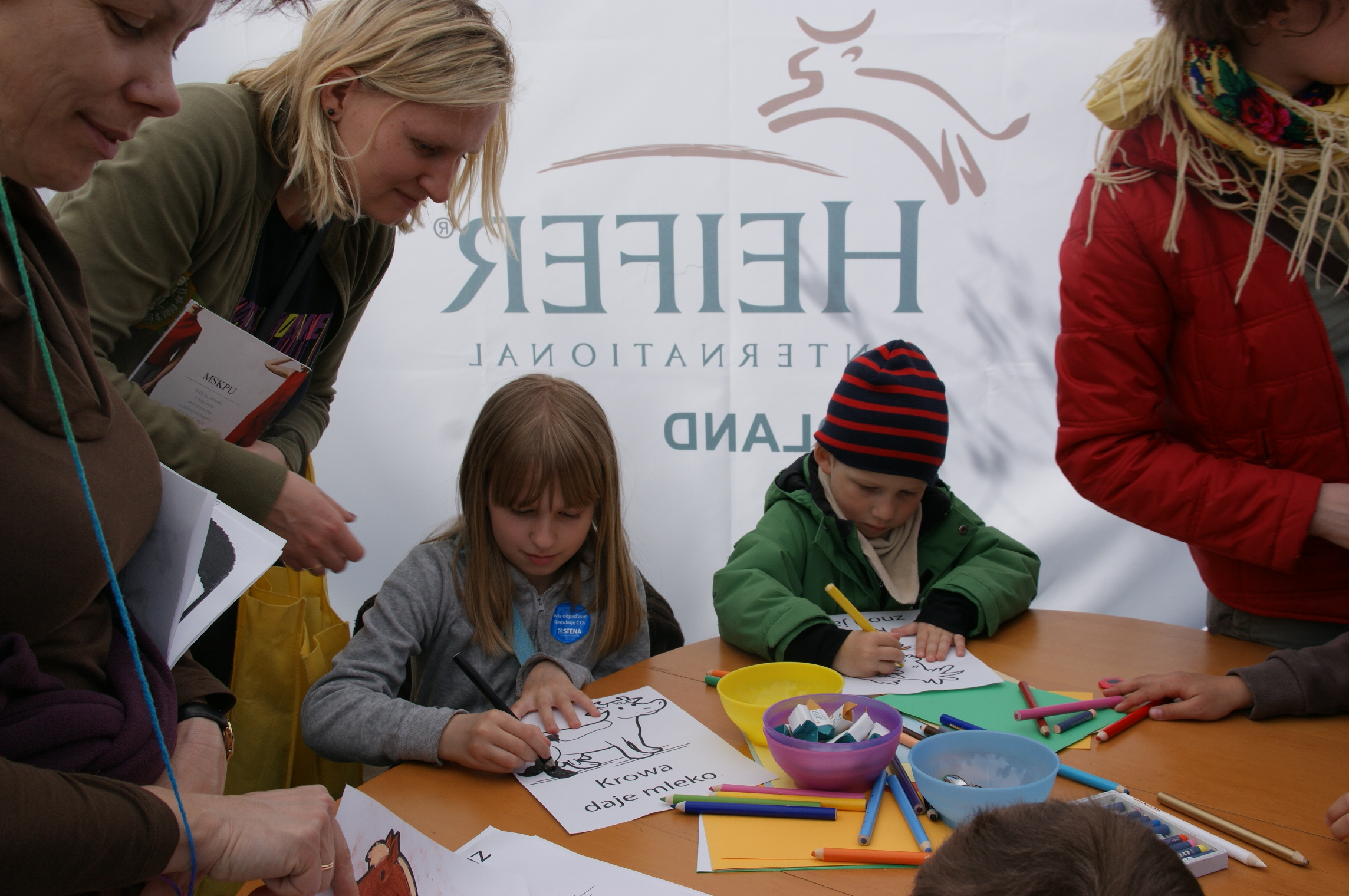 Zdjęcie zostało wykonane podczas festynu Światowy Dzień Ziemi, który odbył się w czerwcu 2011 na stołecznych Polu Mokotowskim